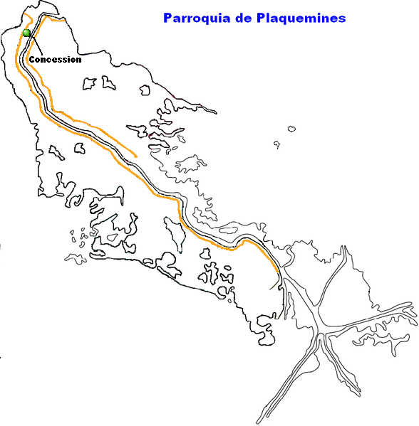 Concession, Louisiana